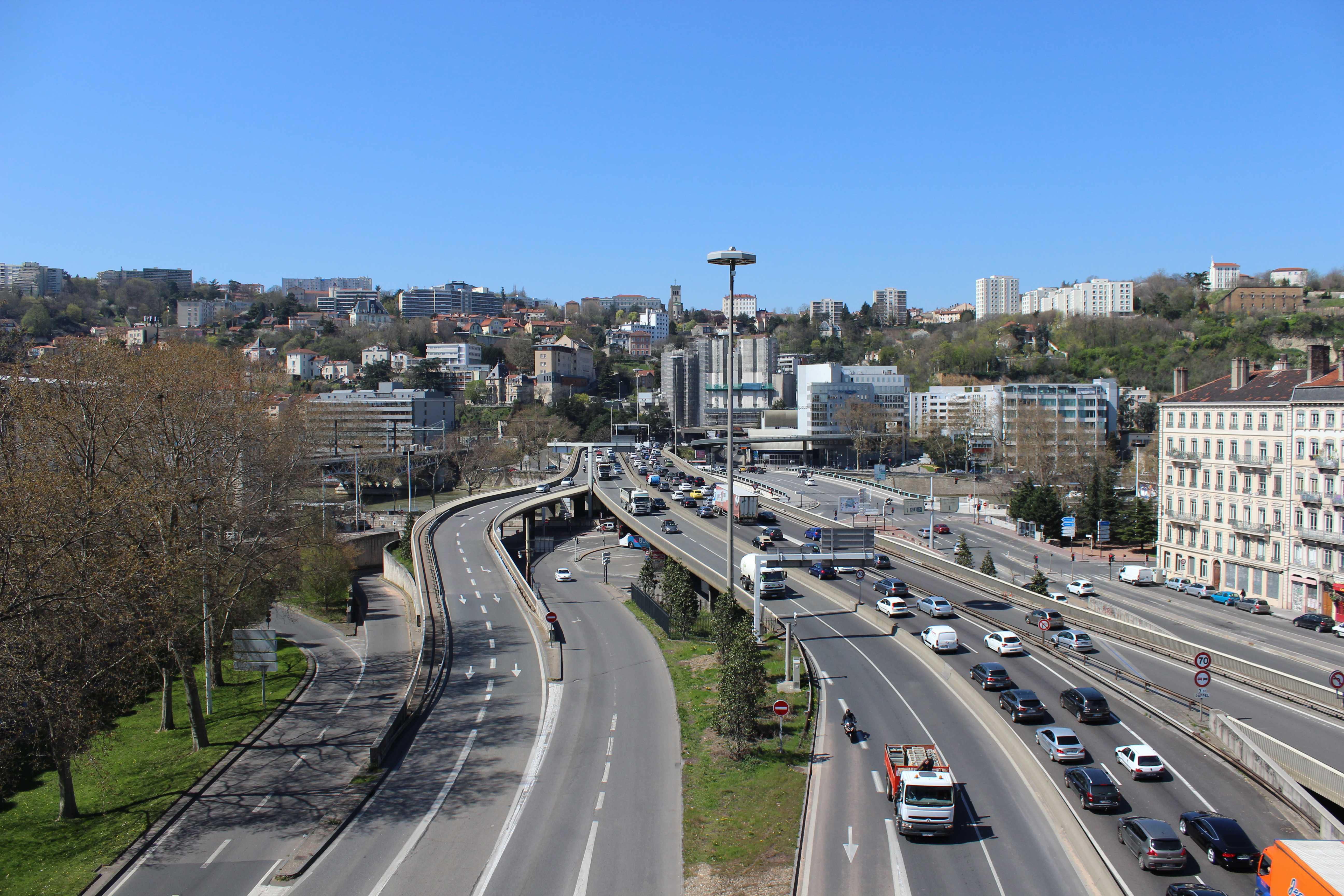 À Lyon, A6 et Pont Kitchener, en direction du tunnel de Fourvière.